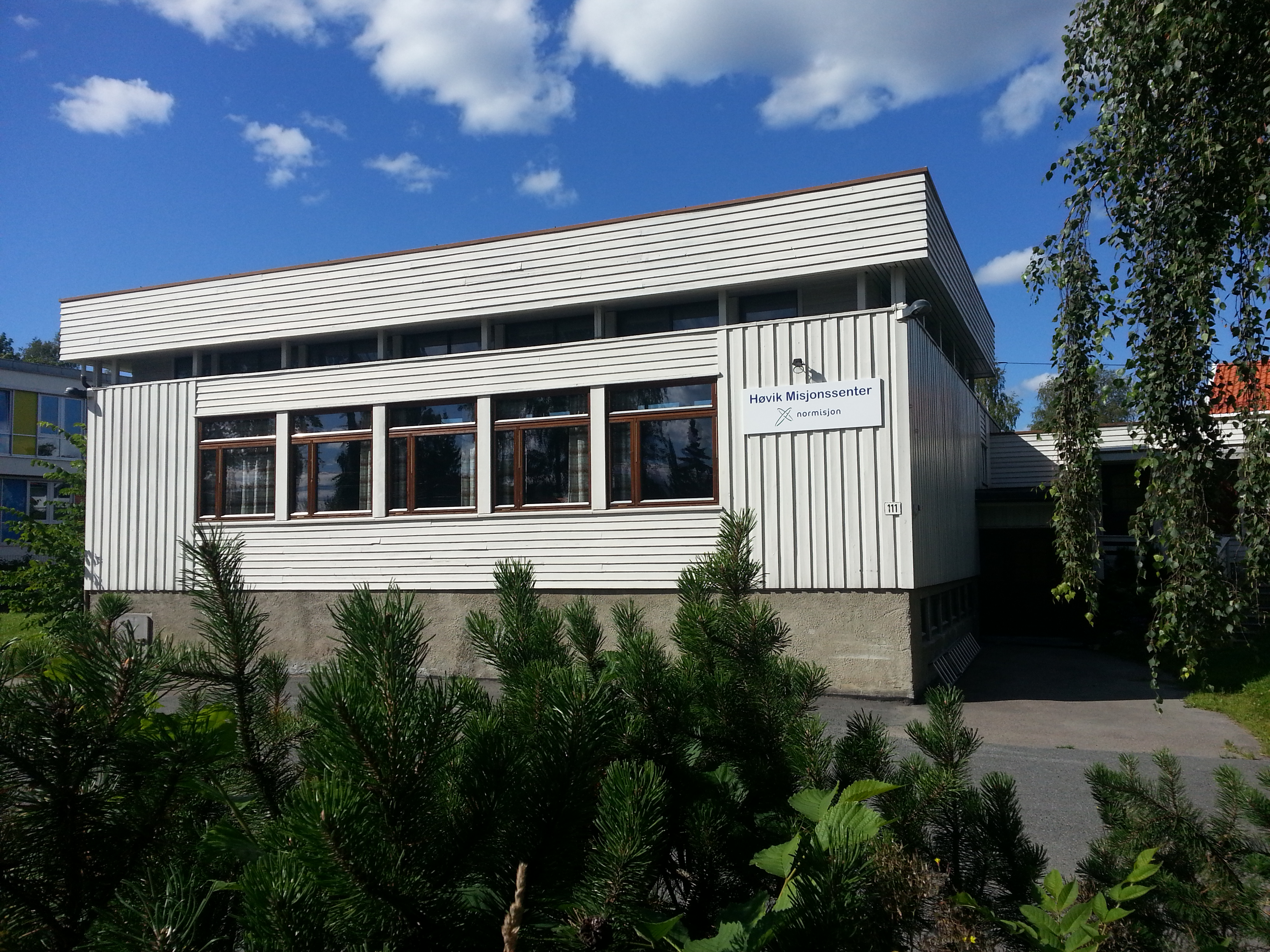 Normisjon